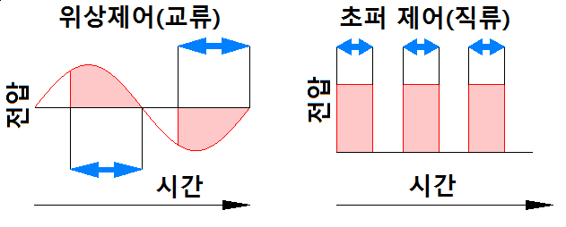 조선말: 위상제어와 초퍼 제어